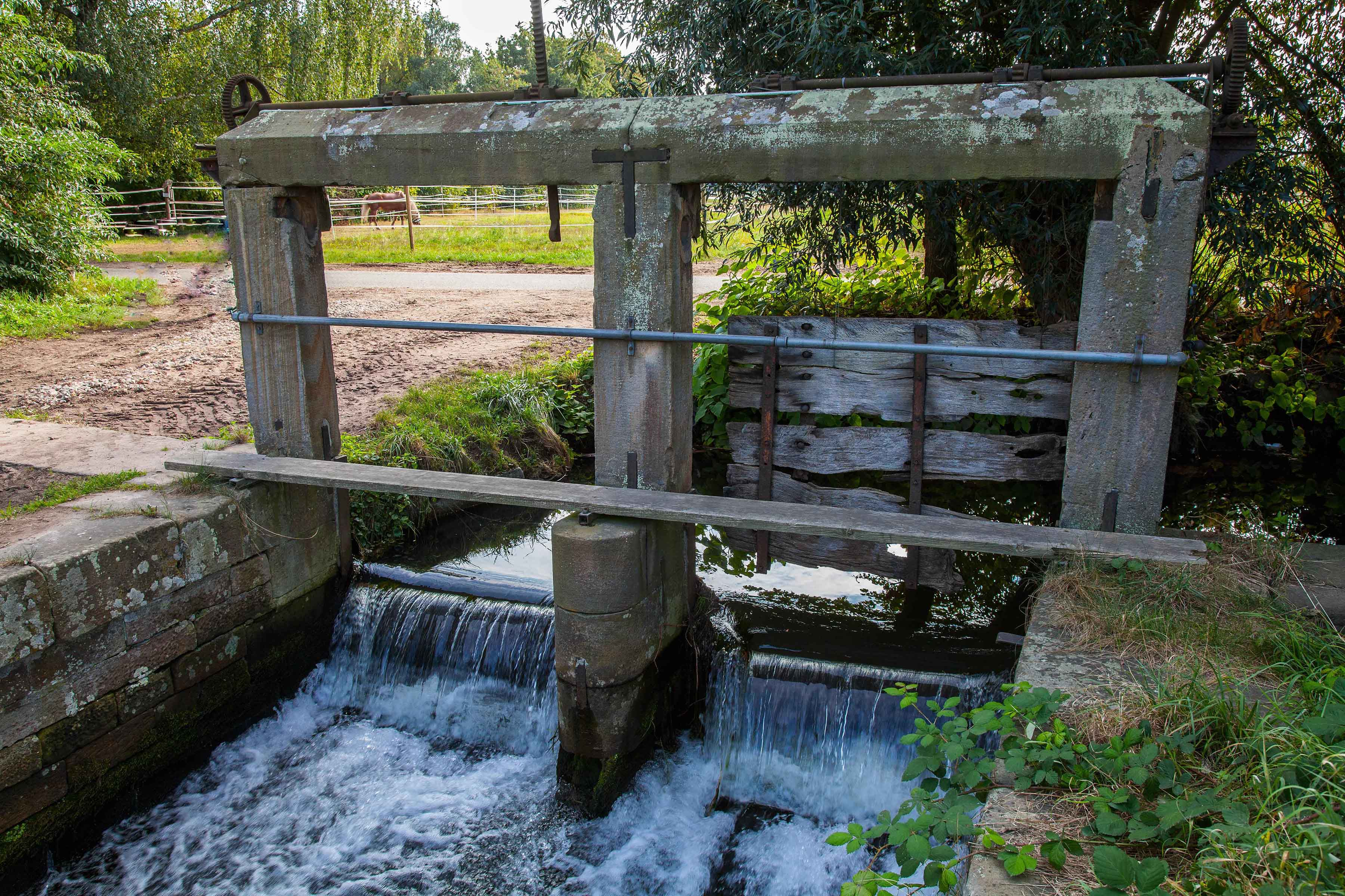 zweiteiliges Wehr, um 1820/30